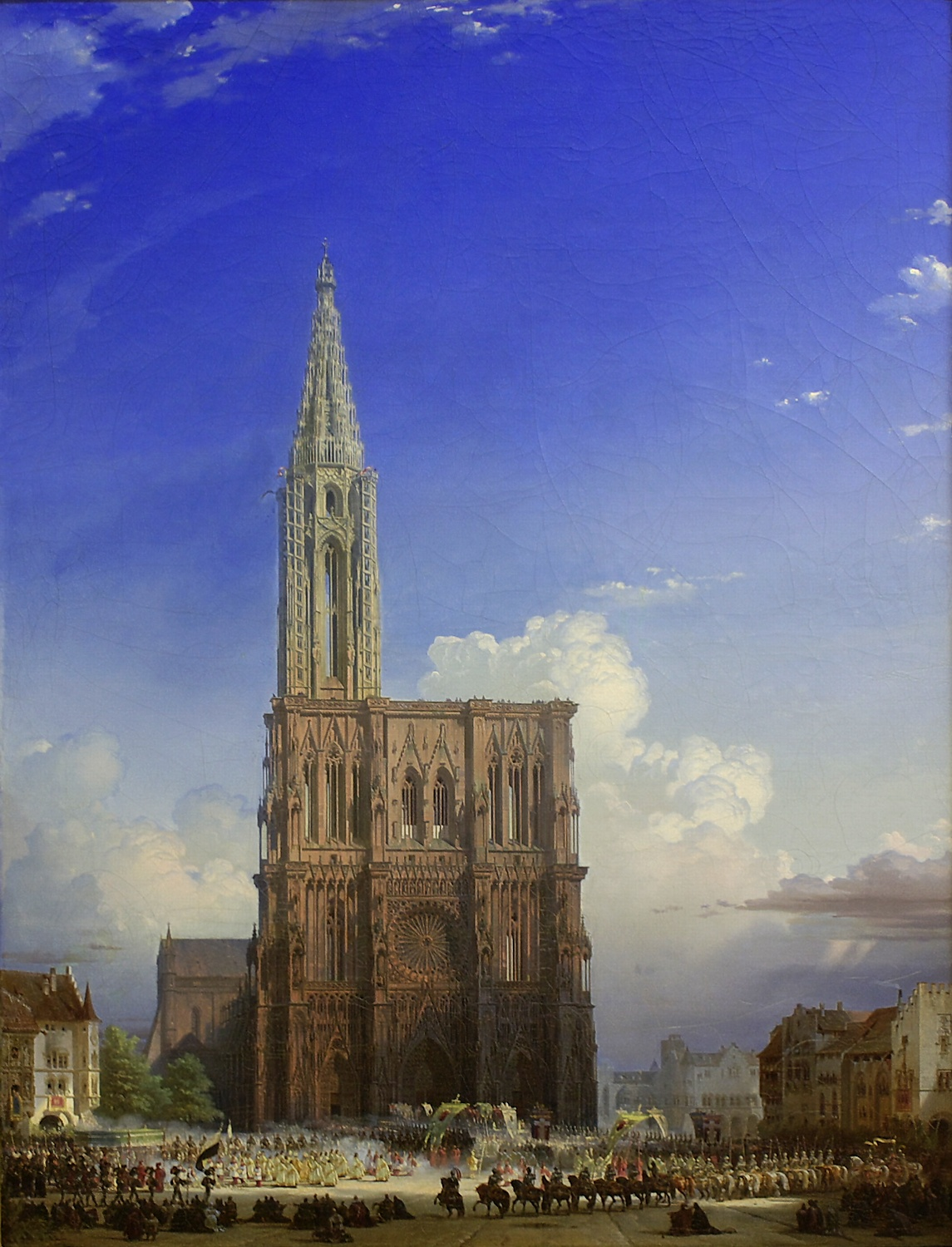 Das Straßburger Münster im Mittelalter. Im Vordergrund eine Fronleichnamsprozession.